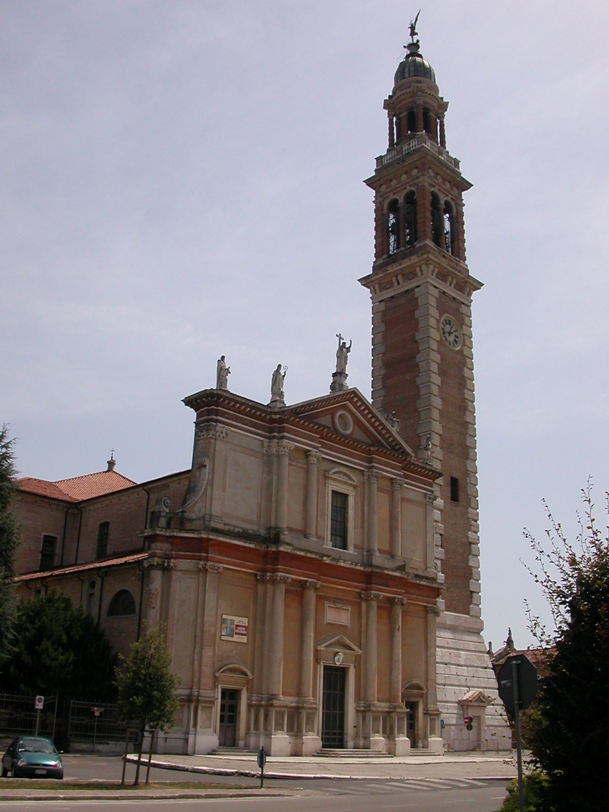 Duomo di Santa Sofia, Lendinara, provincia di Rovigo.